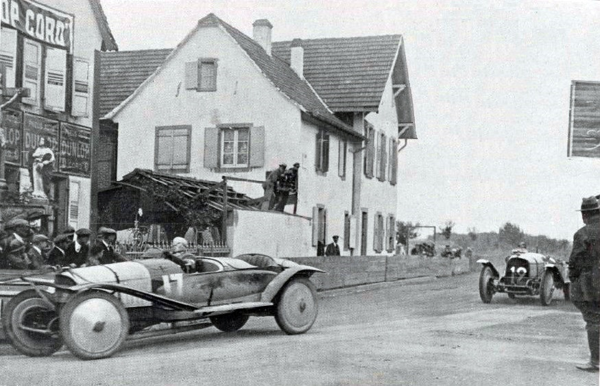 Grand Prix de l'A.C.F. 1922 tourisme à Strasbourg, Piccioni devant Henri Rougier (futur vainqueur), tous deux sur Voisin - Le Sport Universel Illustré du 28 juillet 1922, p.235